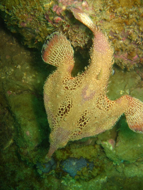 Peixe morcego